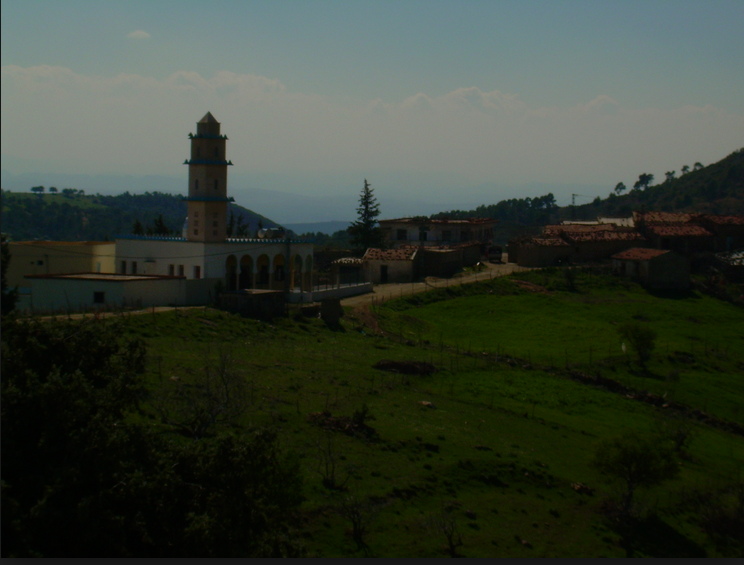 Agouillal - mosque Agouillal